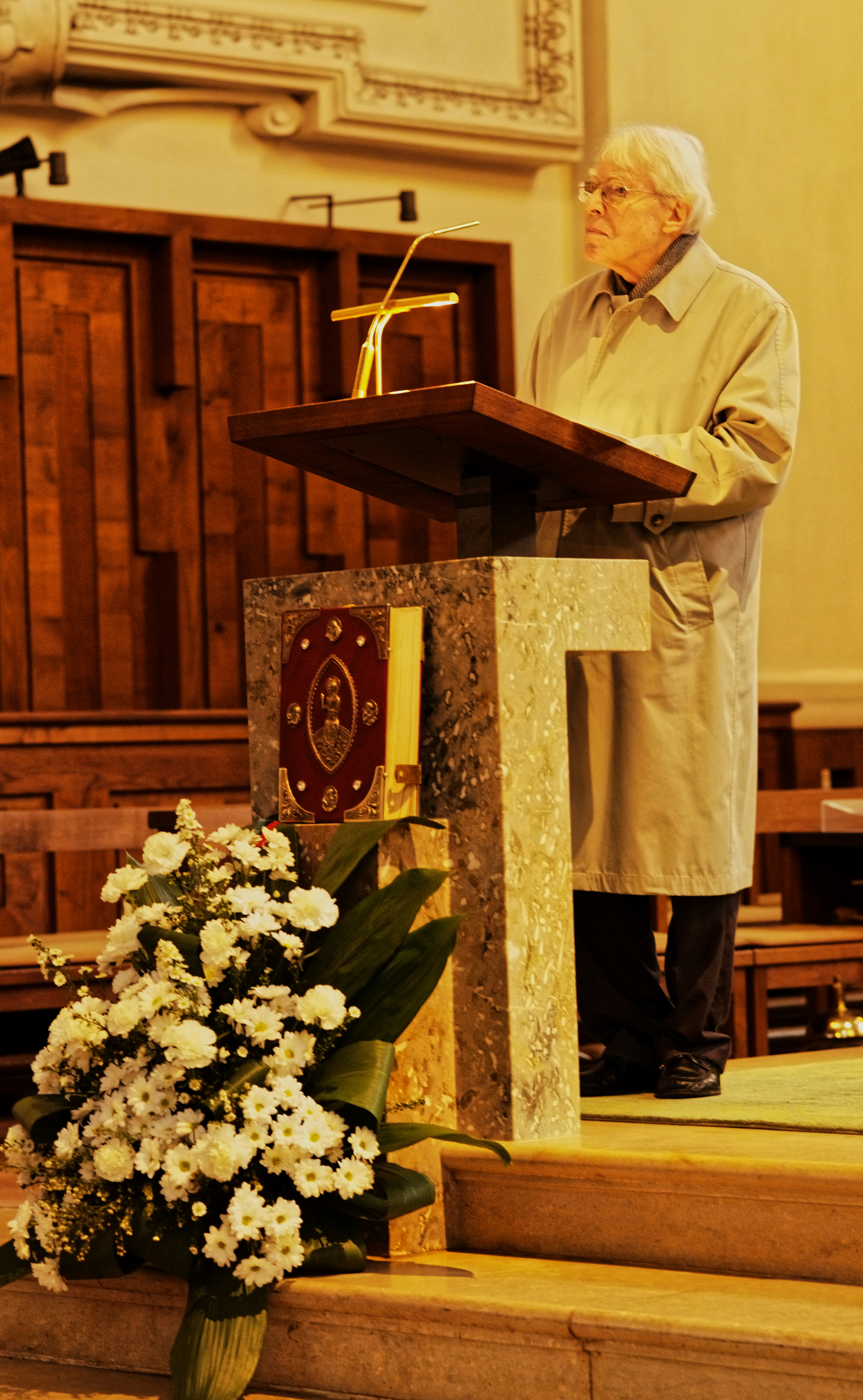 Kuppelorgeln im Salzburger Dom und Vorführung der Orgeln durch Domorganist Dr. Heribert Metzger und Organistin Sarah Kim.